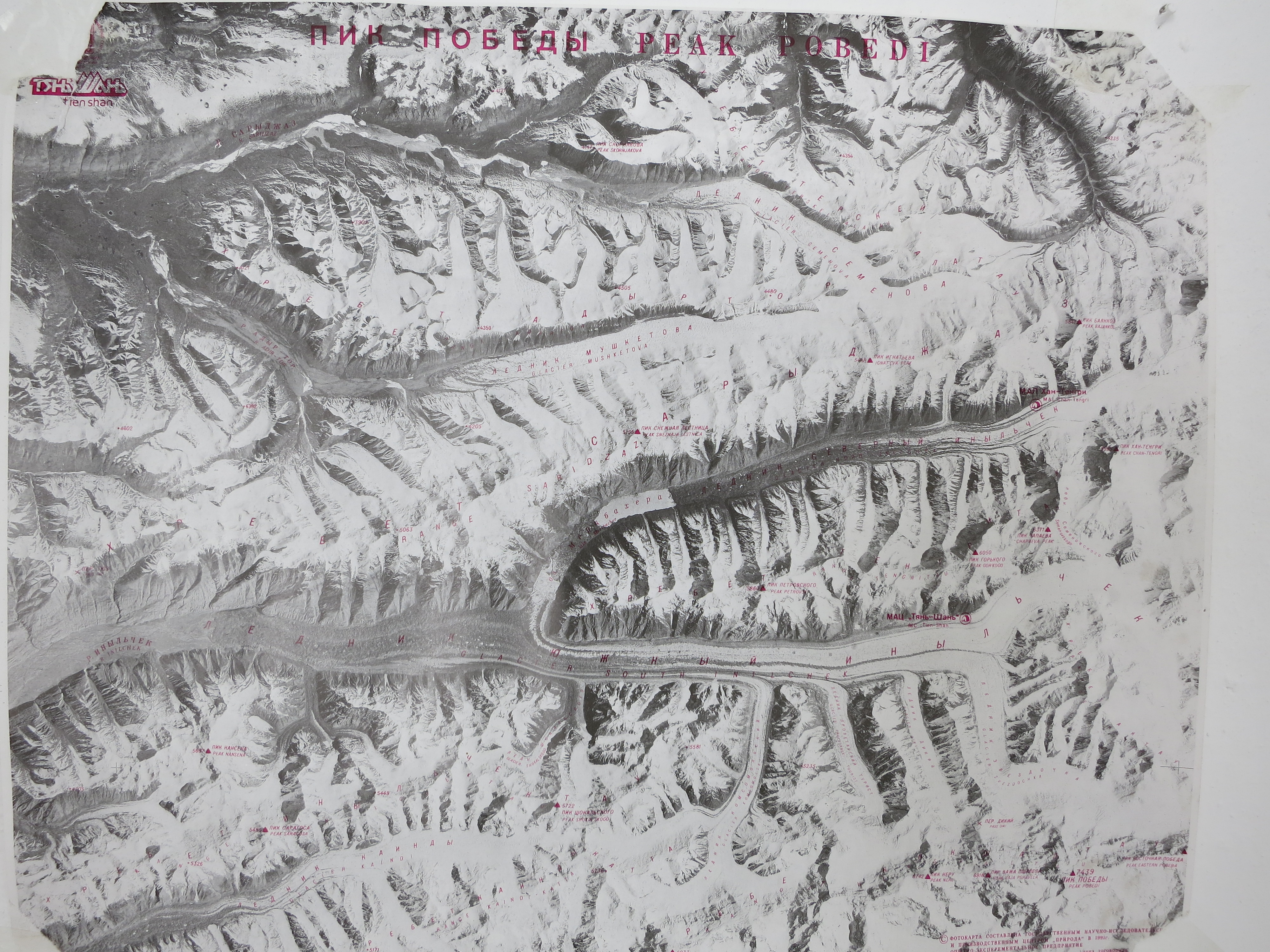 Mapa Chan Tengri